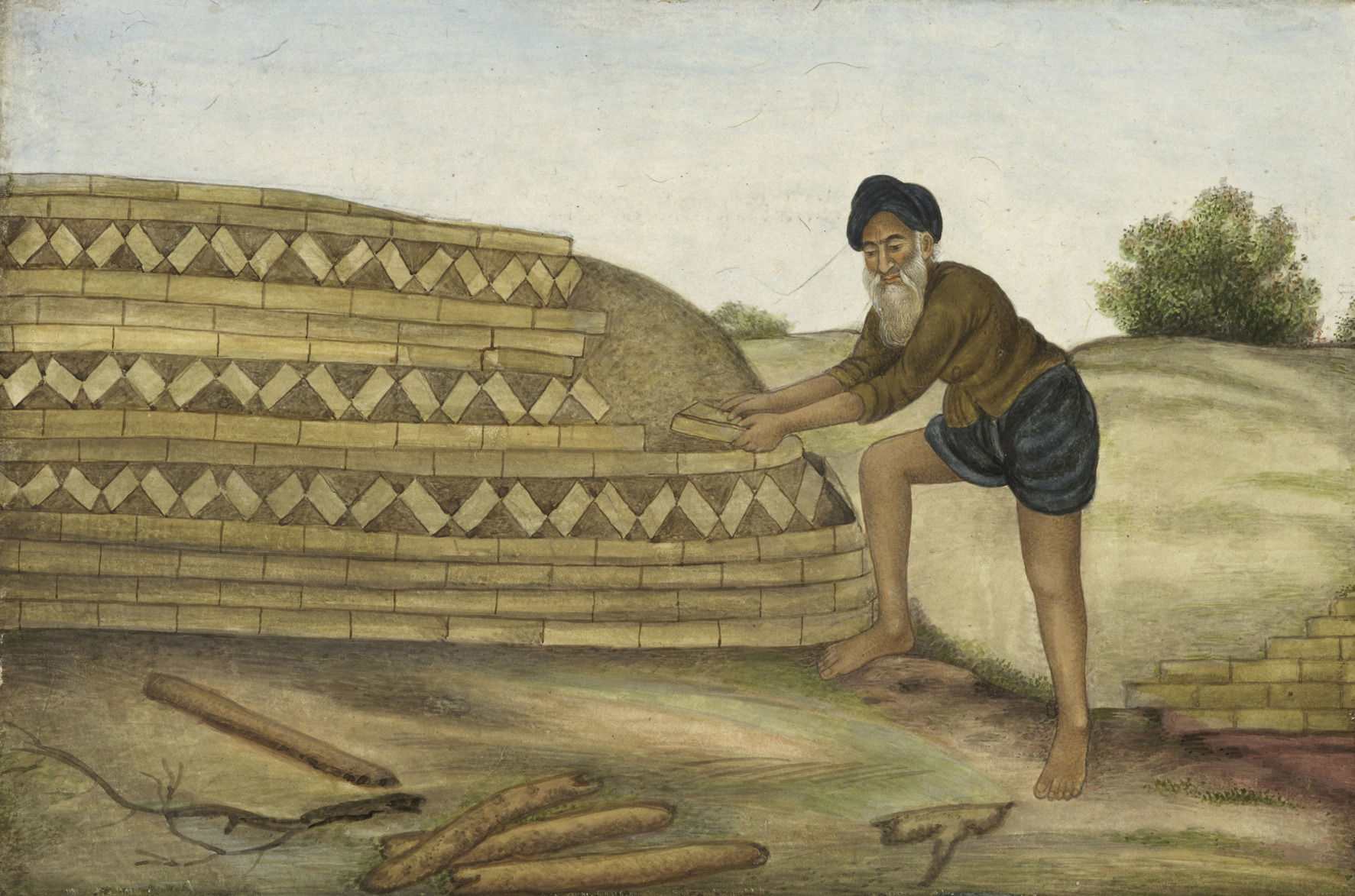 A brickmaker